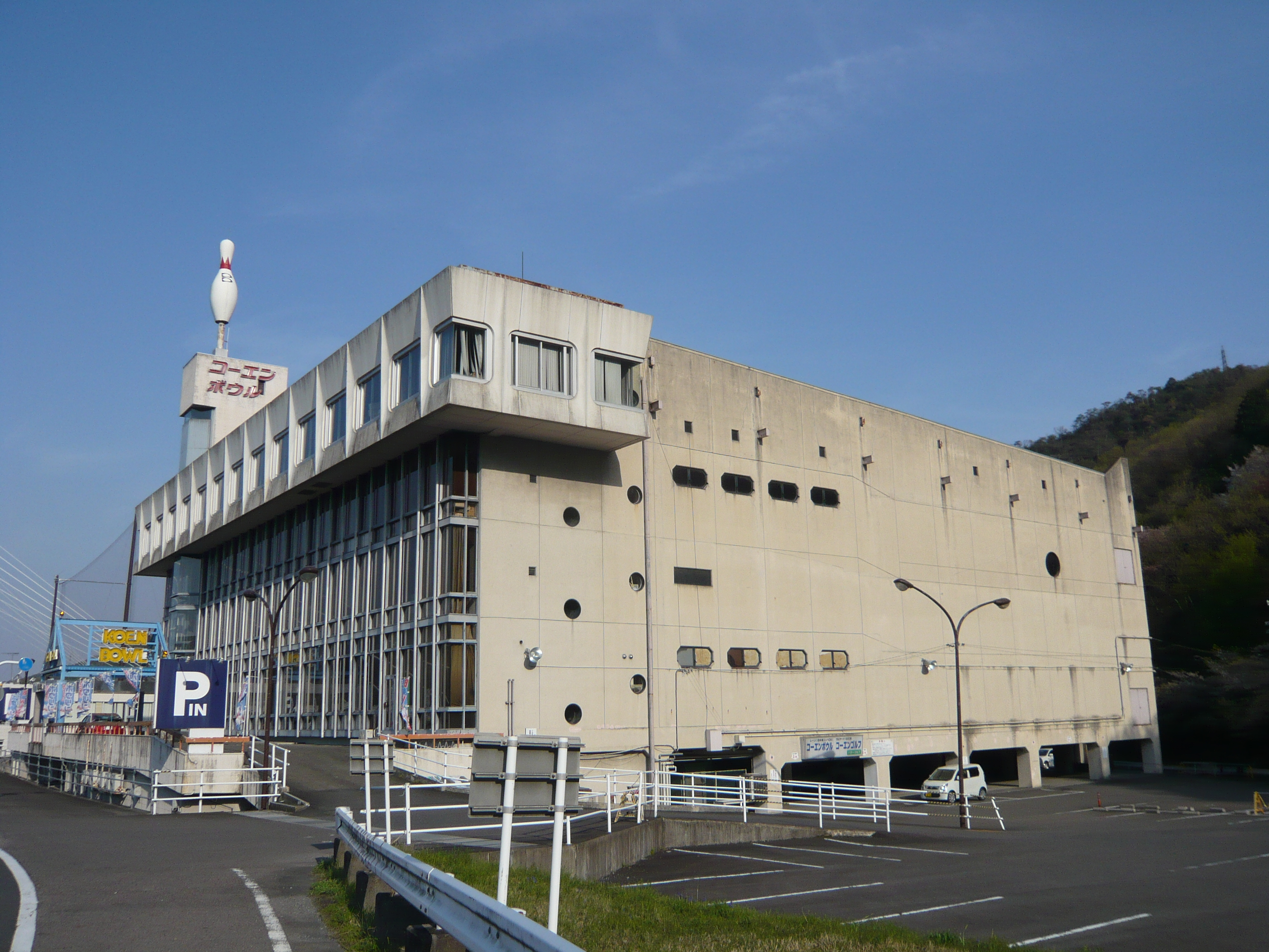 長良川交通公園